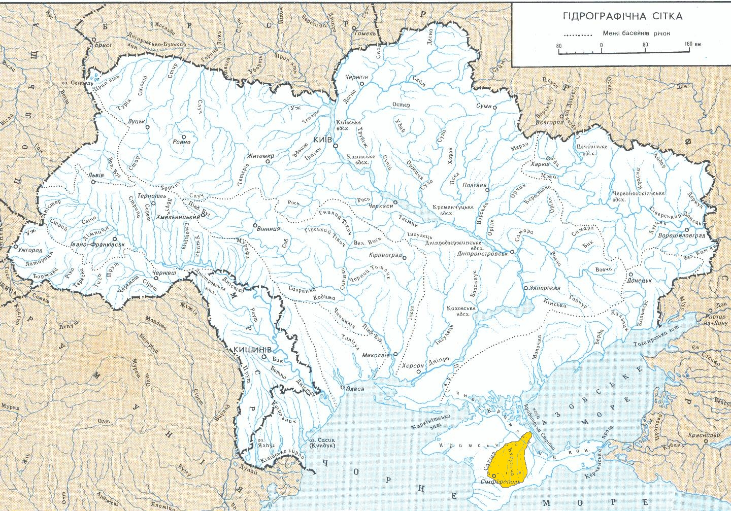 Бассейн реки Салгир.